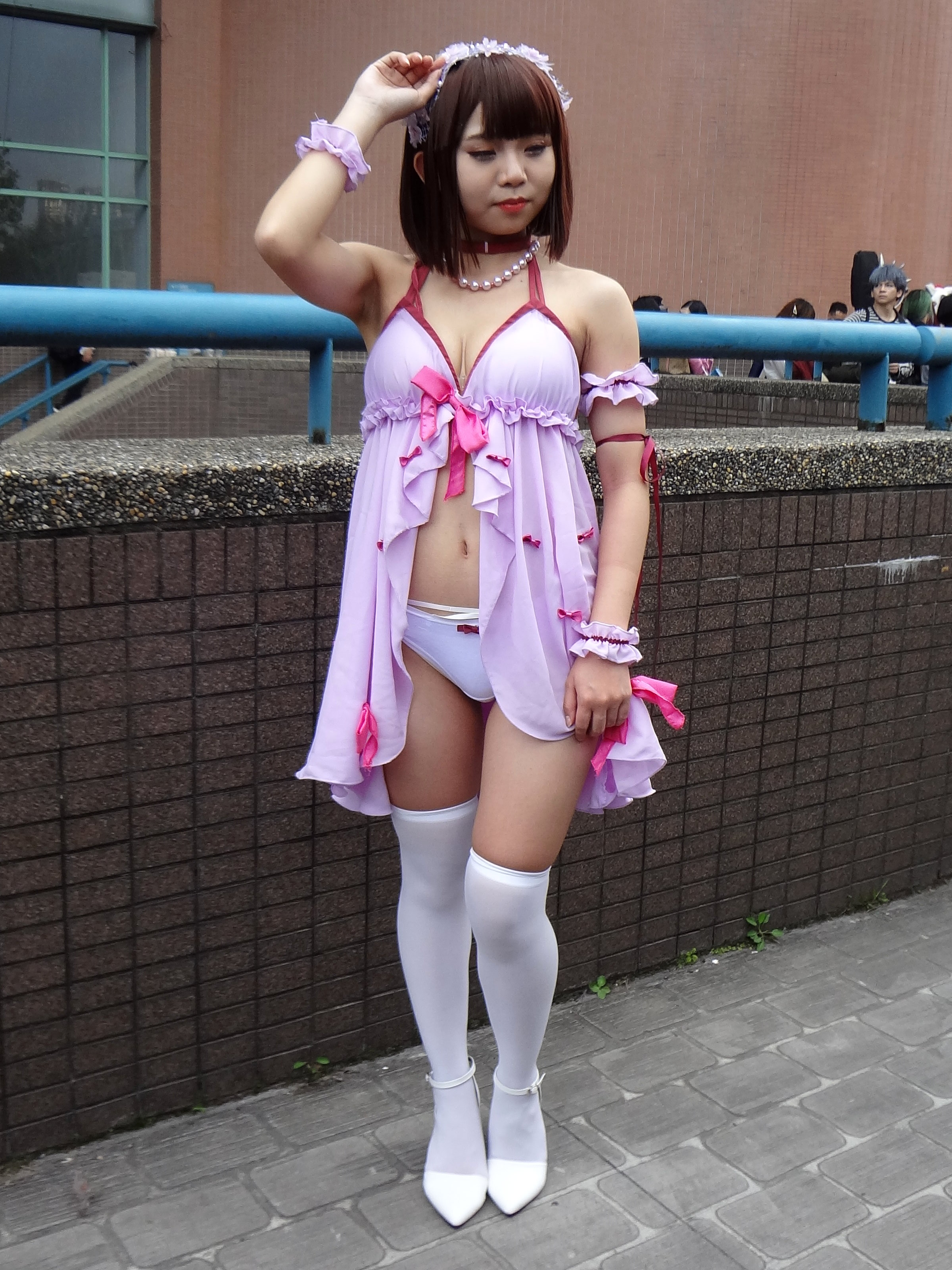 第48屆台灣同人誌販售會，陳玹子cosplay《不起眼女主角培育法》加藤惠。